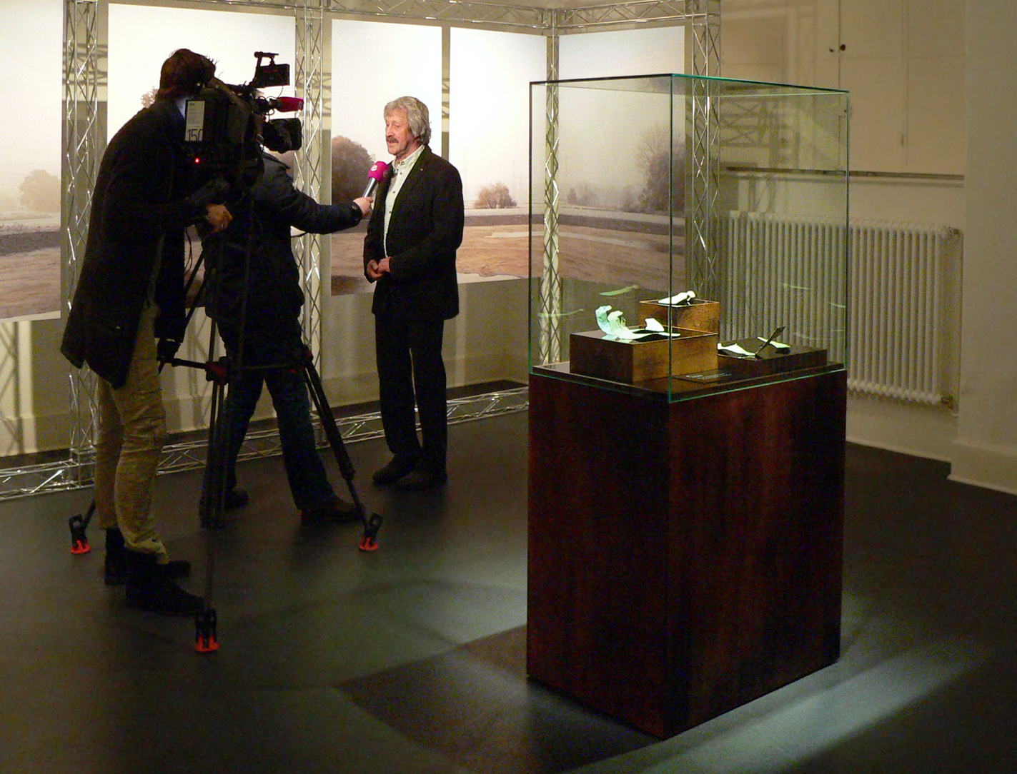 Der Leiter der Stadt- und Kreisarchäologie Osnabrück Bodo Zehm bei einem Interview zum Kupferschatz von Osnabrück, rechts die ausgestellten Fundstücke des Schatzes.